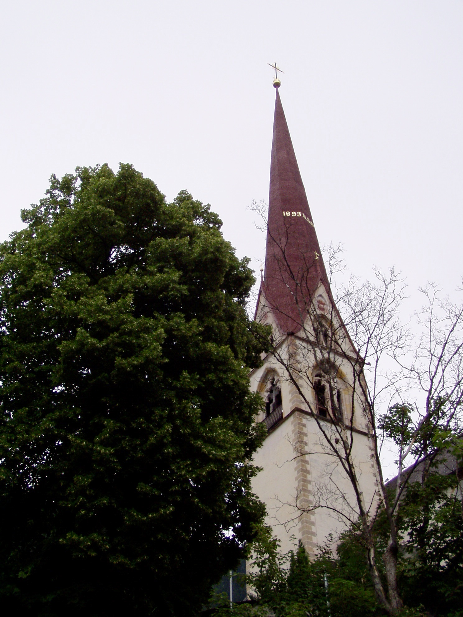 Photographie personnelle du clocher tors de l'église paroissiale de Oetz prise le 06 juillet 2006 par Accrochoc lors d'un voyage en Autriche.